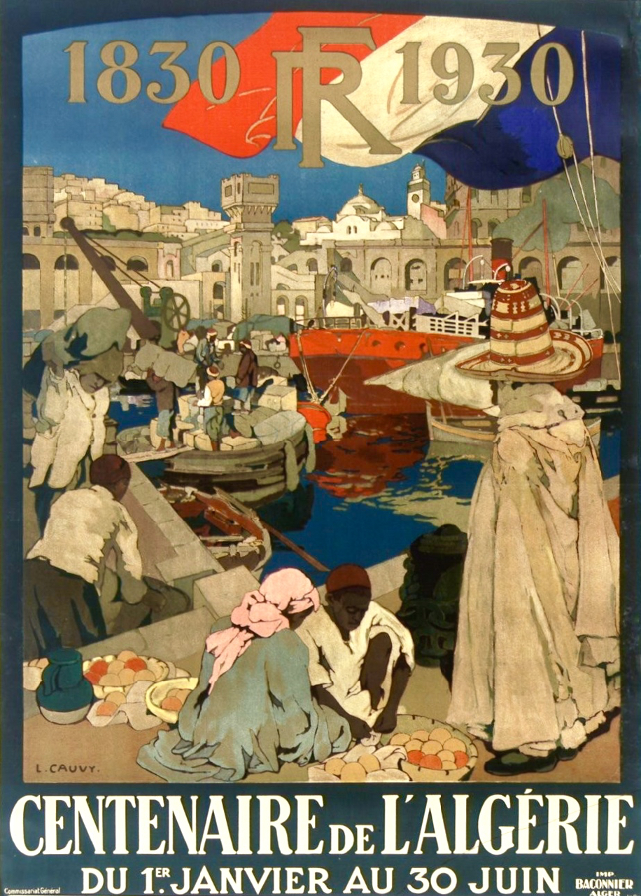 Affiche du Centenaire de l'Algérie (Algérie française), 1930. Auteur : Cauvy, Léon (1874-1933). Illustrateur. Date d'édition : 1929, Alger.